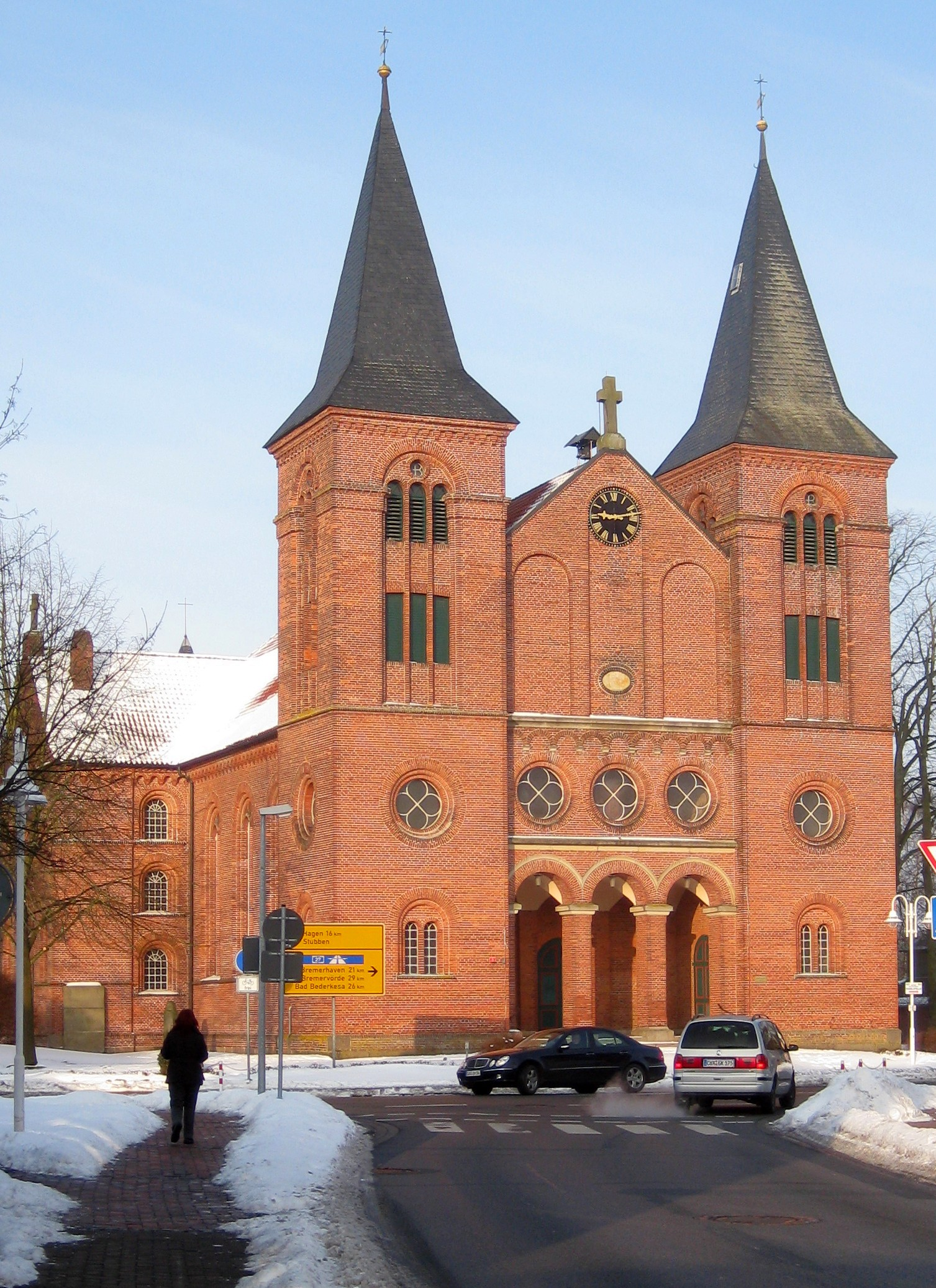 Fabian- und Sebastian-Kirche in Beverstedt